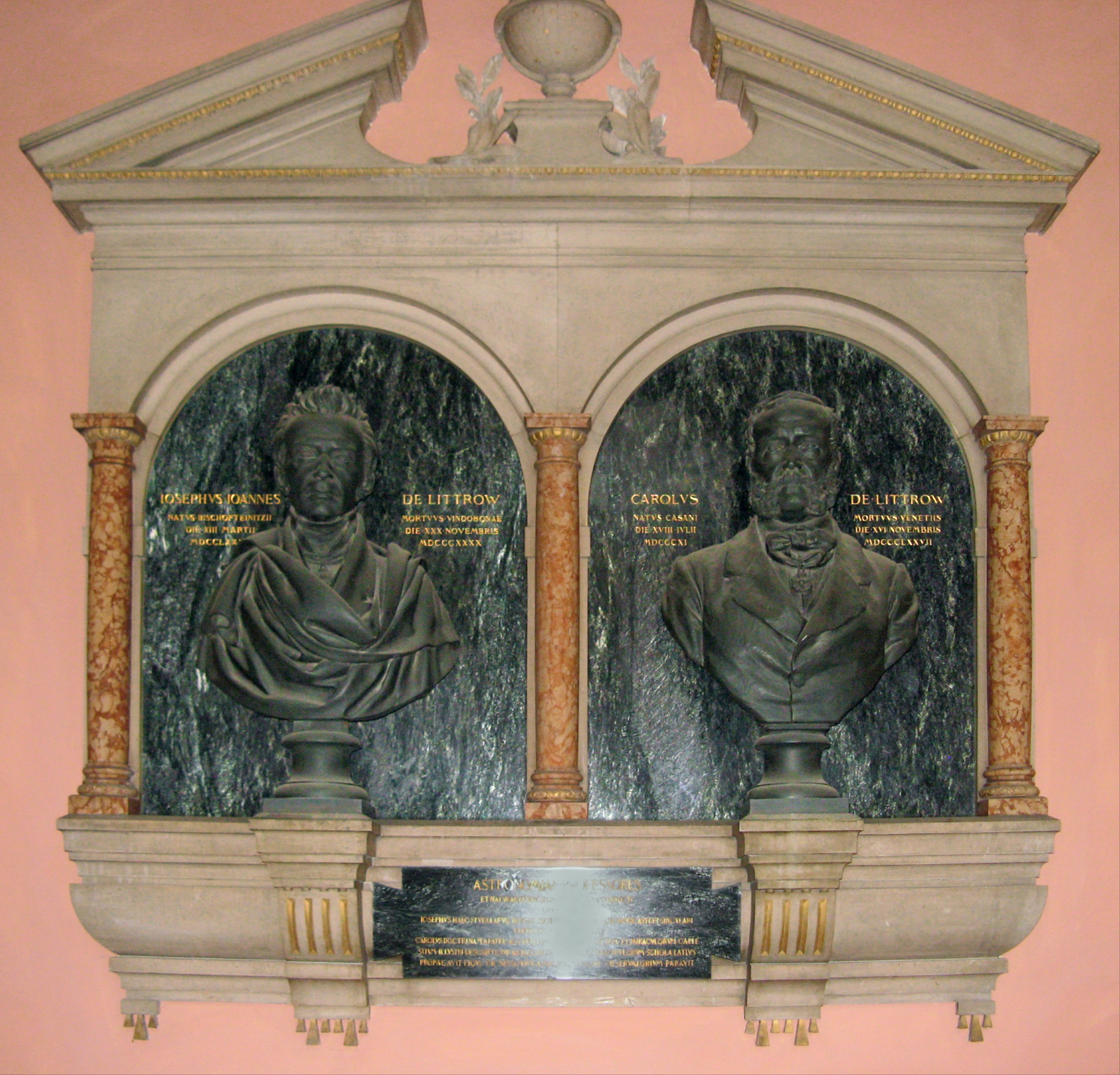 Wien, Universität, Ehrenhalle in den Hofarkaden, Denkmal Josef Johann Littrow und Carl Littrow (Bildhauer: Hans Bitterlich, 1892).